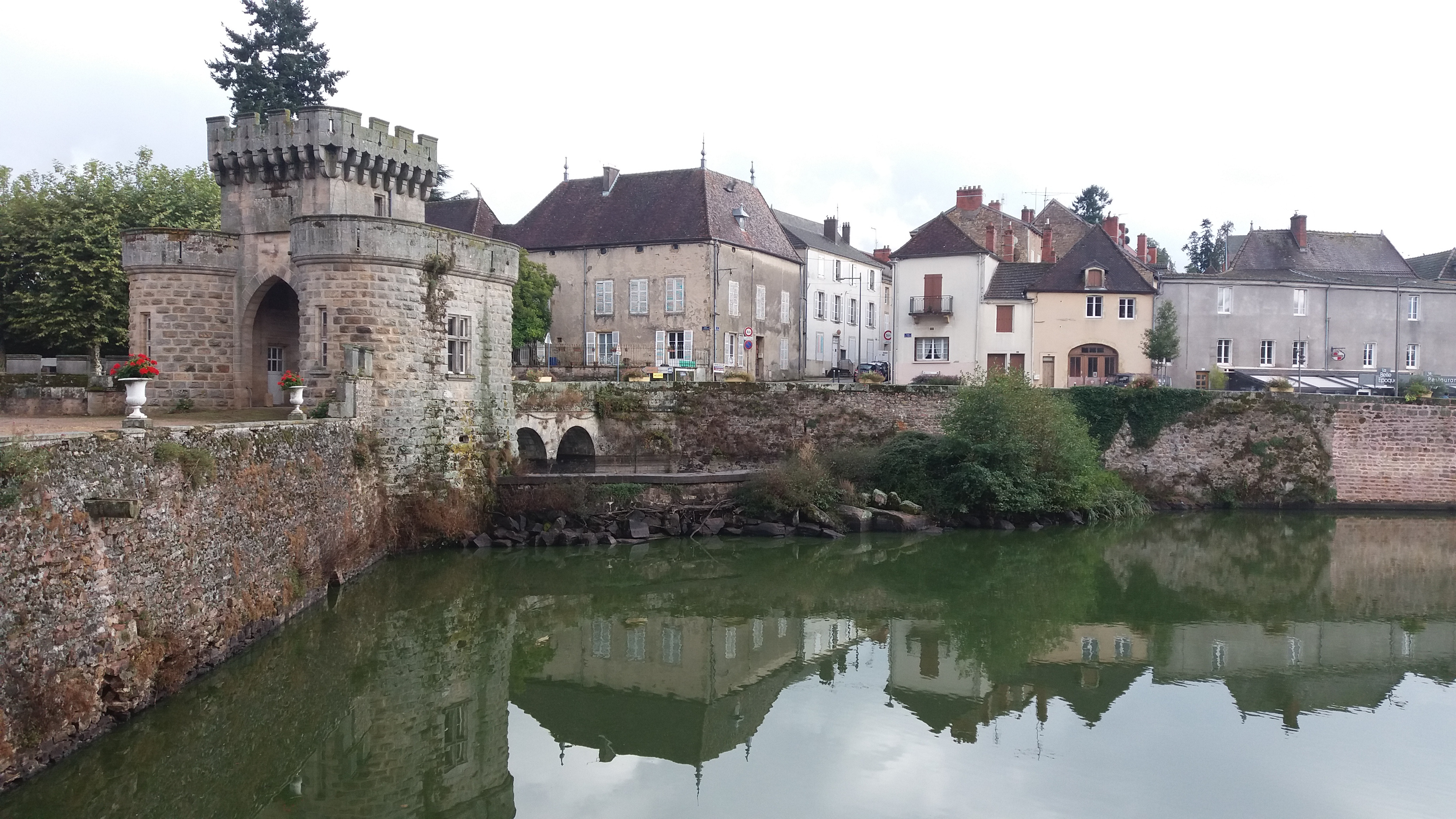 Pont-levis.